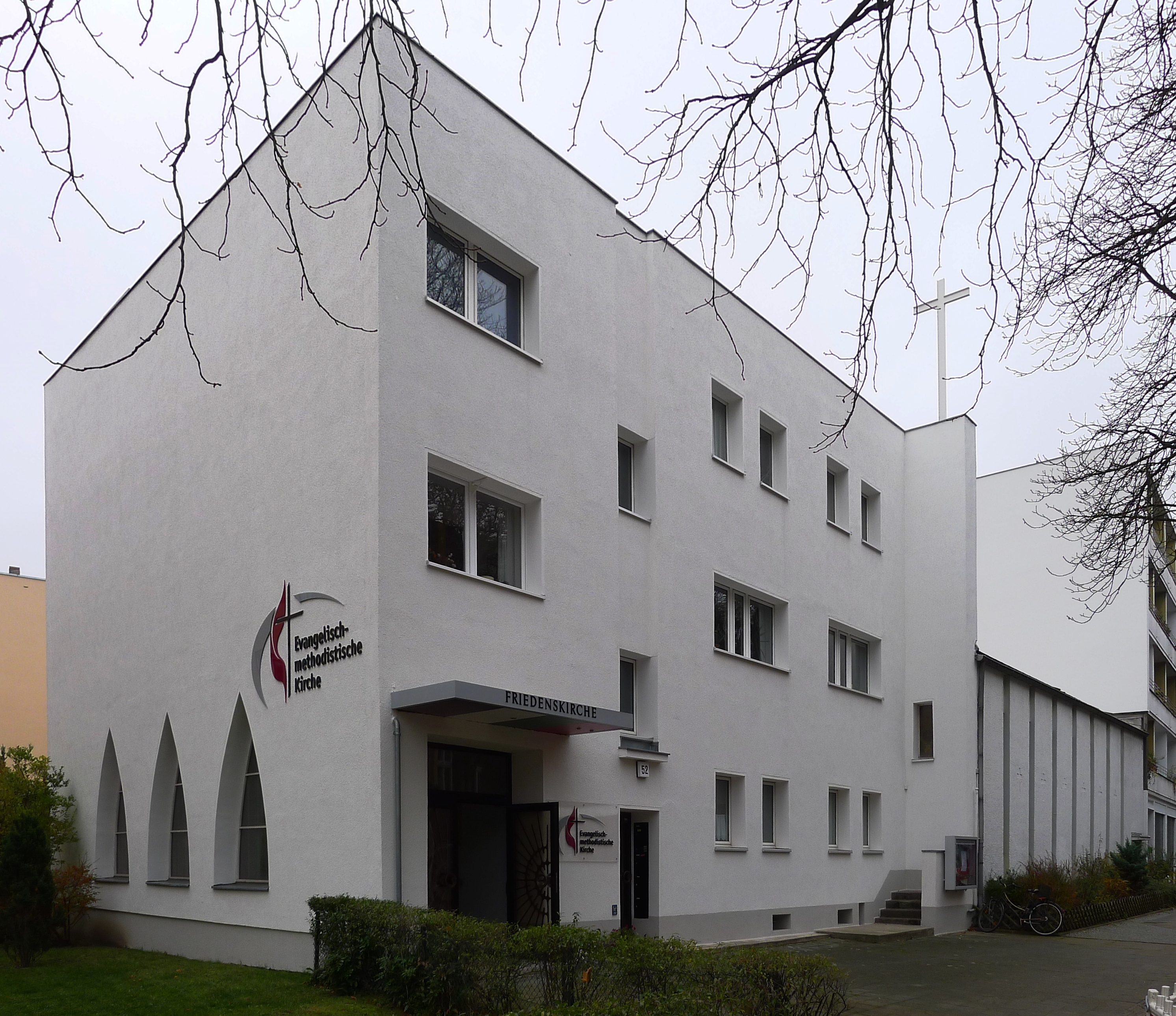 Blick auf Giebel mit Fenstern in der Vorhalle